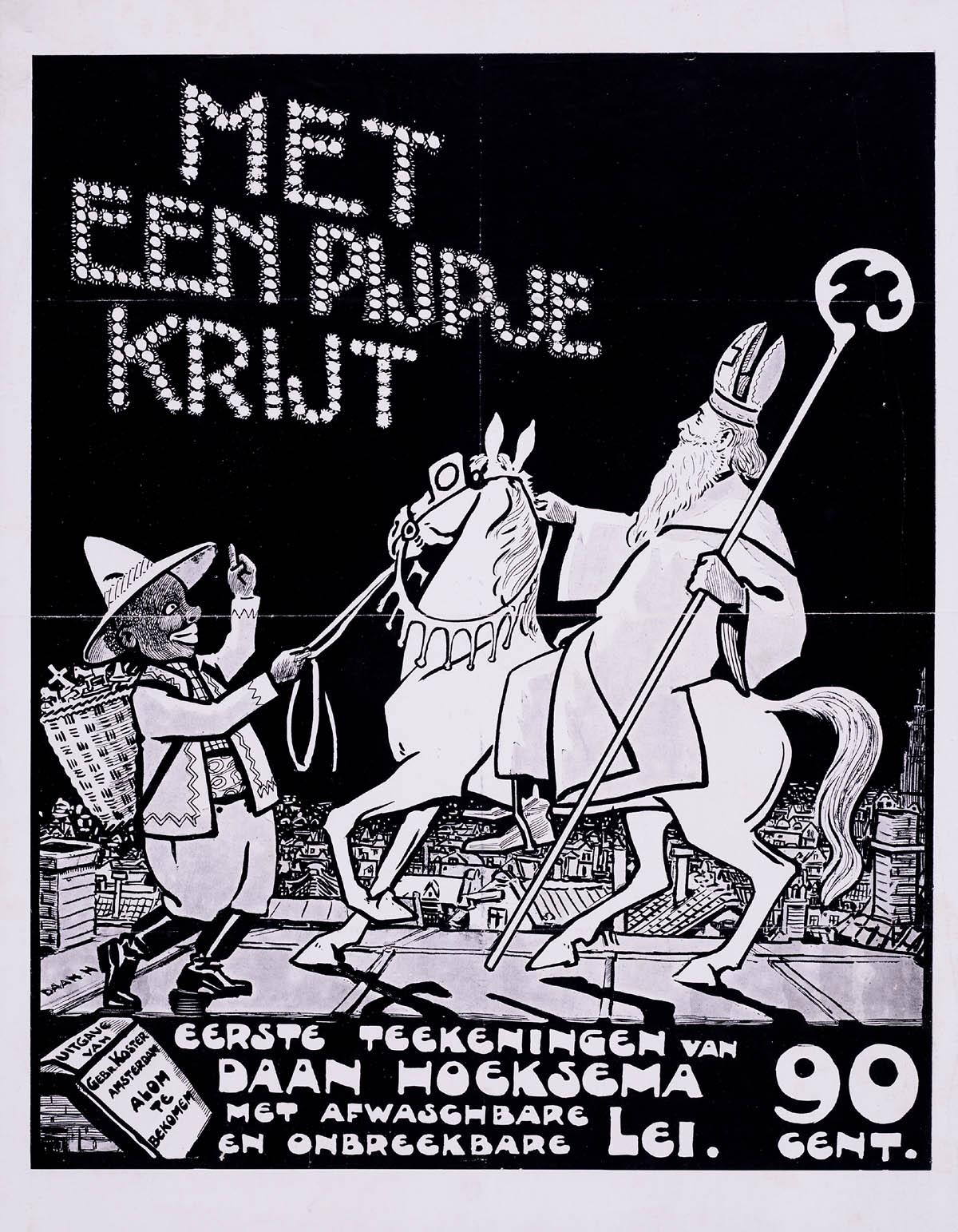 Affiche: Met een pijpje krijt. Opdrachtgever/adverteerder: Gebroeders Koster (Amsterdam)